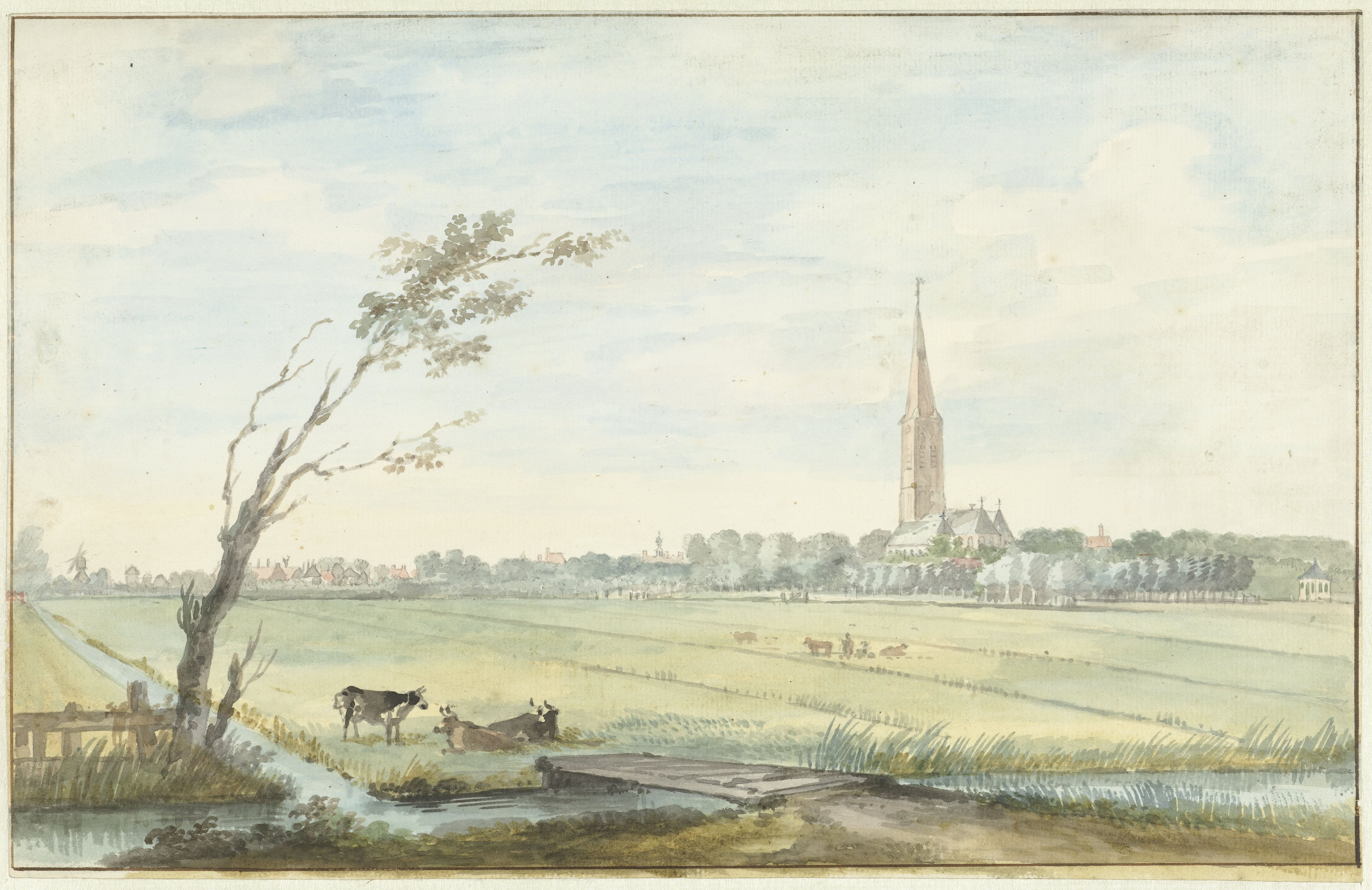 IdentificatieTitel(s): Het dorp 's-GravezandeObjecttype: tekening aquarel Objectnummer: RP-T-1918-431Opschriften / Merken: opschrift, verso: ‘Schravesande 1745 A. Schouman’VervaardigingVervaardiger: tekenaar: Aert SchoumanDatering: 1745Fysieke kenmerken: penseel in waterverf in kleurenMateriaal: papier waterverf Techniek: penseelAfmetingen: h 201 mm × b 312 mmOnderwerpWat: names of cities and villages (with NAME)prospect of village, silhouette of villagechurch (exterior)Waar: 's-GravenzandeVerwerving en rechtenCredit line: Schenking van de heer C.P.D. PapeVerwerving: schenking 1918Copyright: Publiek domein